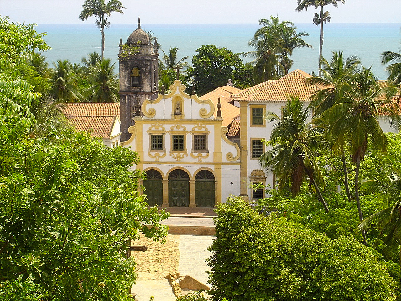 Convento de Nossa Senhora das Neves in Olinda, Brazil.